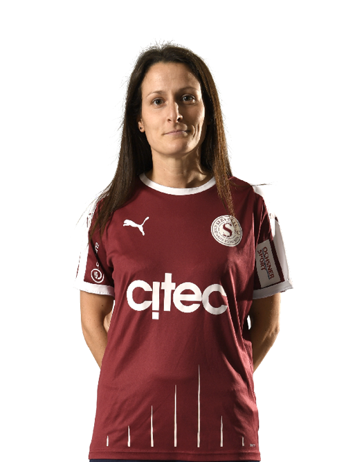 Photo de profil joueuse Maeva Sarrasin du Servette Football Club Chênois féminin